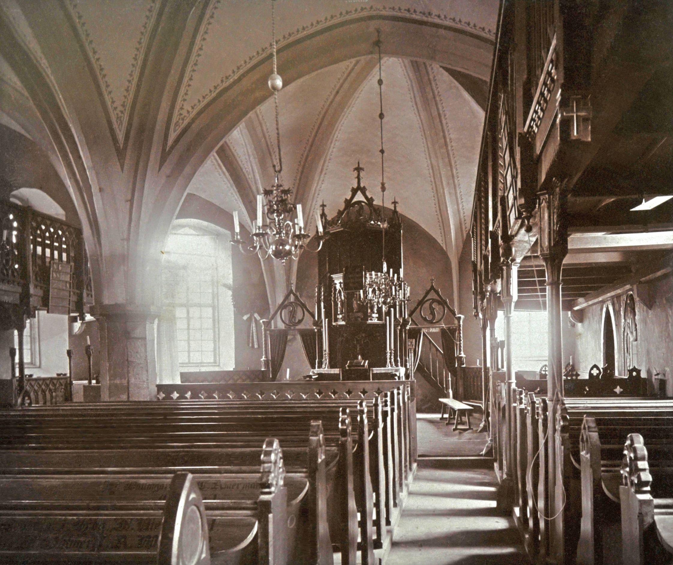 Das Bild zeigt den Innenraum der St. Dionysius-Kirche in Adensen so, wie er in den Jahren 1852-1958 ausgesehen hat. Die auf dem Bild teilweise sichtbare Innenausstattung der St. Dionysius-Kirche aus dem Jahr 1852 mit Kirchengestühl, Emporen, Kanzelaltar und Orgelprospekt erfolgte im neugotischen Stil unter der Leitung des hannoverschen Landesbaumeisters Wellenkamp. Die geschnitzten Kanzelfiguren stammen von dem hannoverschen Bildhauer Georg Ludwig Hurtzig (* 27. März 1812 in Hannover, † 14. Oktober 1865 in Hannover). Die Orgel wurde 1852 von dem Orgelbaumeister Philipp Furtwängler in Elze erbaut. Auf den Gesangbuchablagen stehen noch die Namen der Gemeindeglieder, die dort ihren Sitzplatz hatten. Im Jahr 1958 wurde die St. Dionysius-Kirche renoviert. Die Emporen im Chor der Kirche sind dabei entfernt worden, um Raum zu schaffen für das Adenser Kruzifix, das seitdem an der südlichen Chorwand angebracht ist. Weitere Änderungen im Innenraum und an der neugotischen Innenausstattung bis hin zu den bleiverglasten Fenstern führten zu einer noblen Schlichtheit des gotischen Raumes. Erfreulich ist, dass die wertvolle neugotische Innenausstattung trotz der Ablehnung der Neugotik in der Mitte des 20. Jahrhunderts erhalten blieb, während sie in zahlreichen anderen niedersächsischen Kirchen entfernt wurde. Vermutlich wurde dieses Bild vor 1919 aufgenommen; denn nach dem Ersten Weltkrieg wurde der Kranz für die Gefallenen am damals erbauten Ehrenmal niedergelegt und nicht mehr im Chor der Kirche aufgehängt, wie das auf dem Bild noch sichtbar ist.